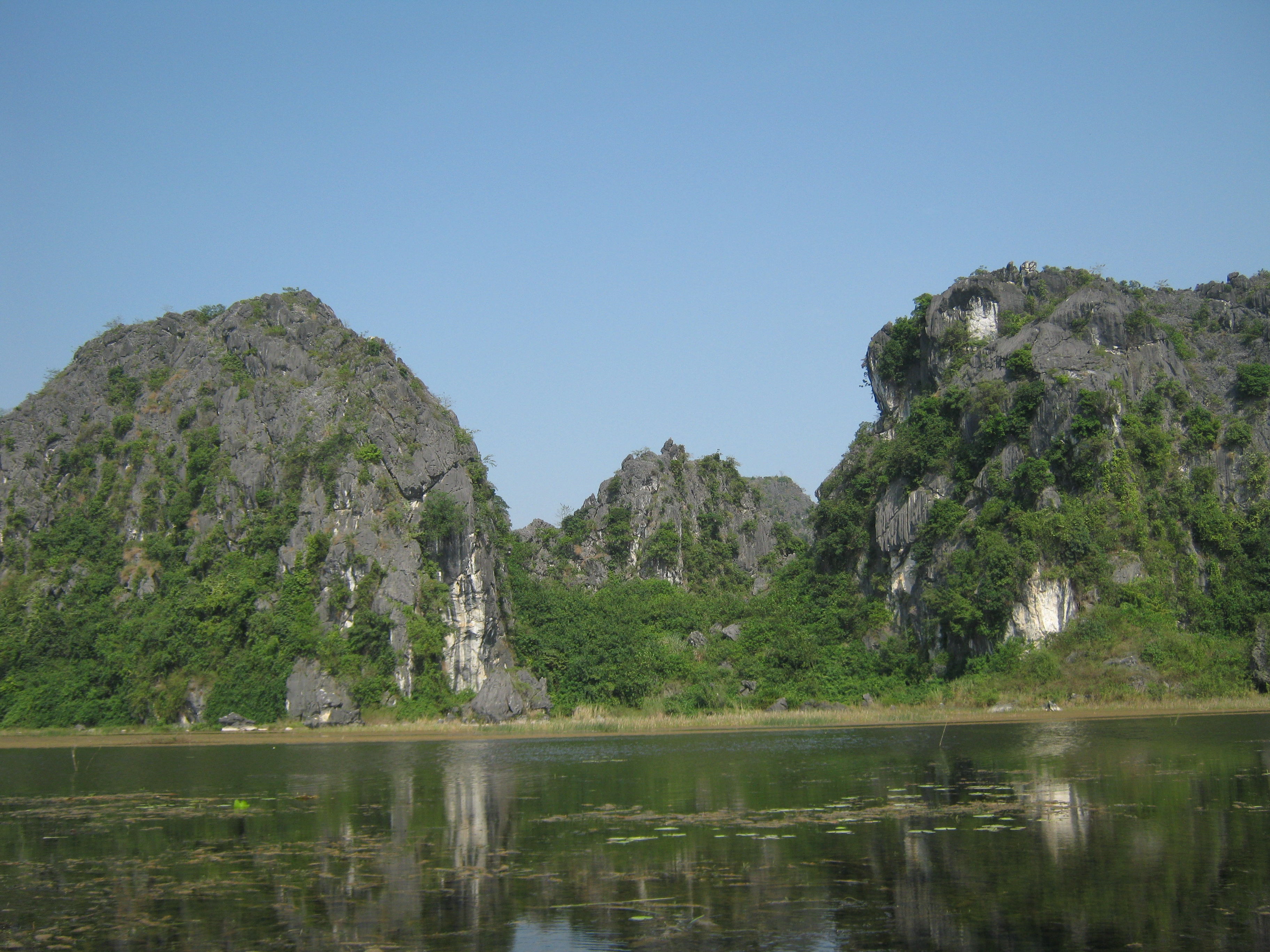 khu bảo tồn thiên nhiên Vân Long ở Gia Viễn tỉnh Ninh Bình